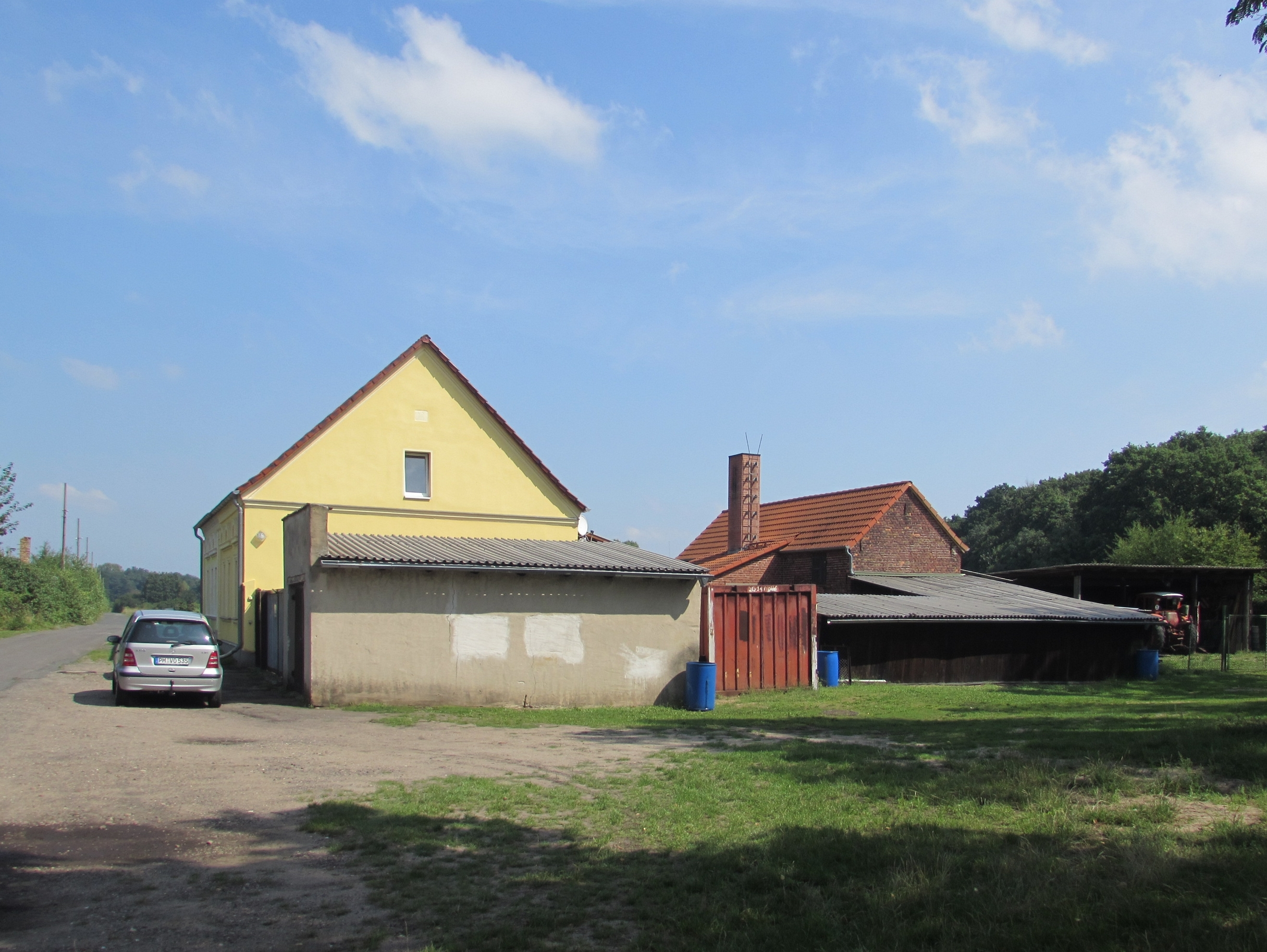 wohnplatz herrenmühle bei bücknitz, ziesar